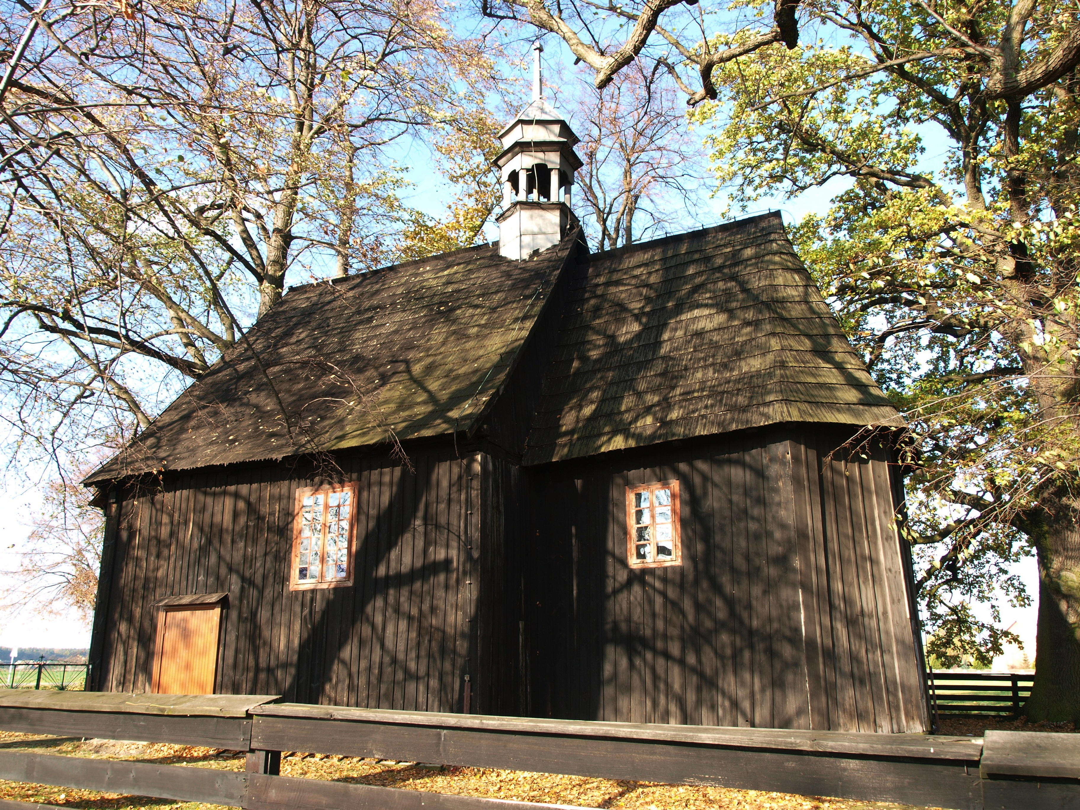 Mokra Mokra- kościół (kaplica) pw. św. Szymona i Judy, drewn., XVIII, nr rej.: 1122/69 z 27.12.1969 oraz 61/78 z 17.02.1978